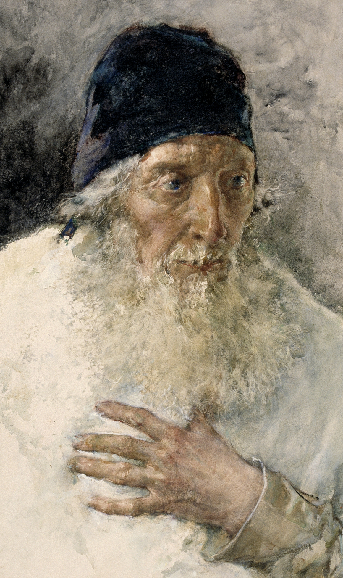 Francisco Pradilla, Marino Faliero, Dux LV, 1883, acuarela sobre papel, 725 x 515 mm. Adquirido por el Museo del Prado en 2001.